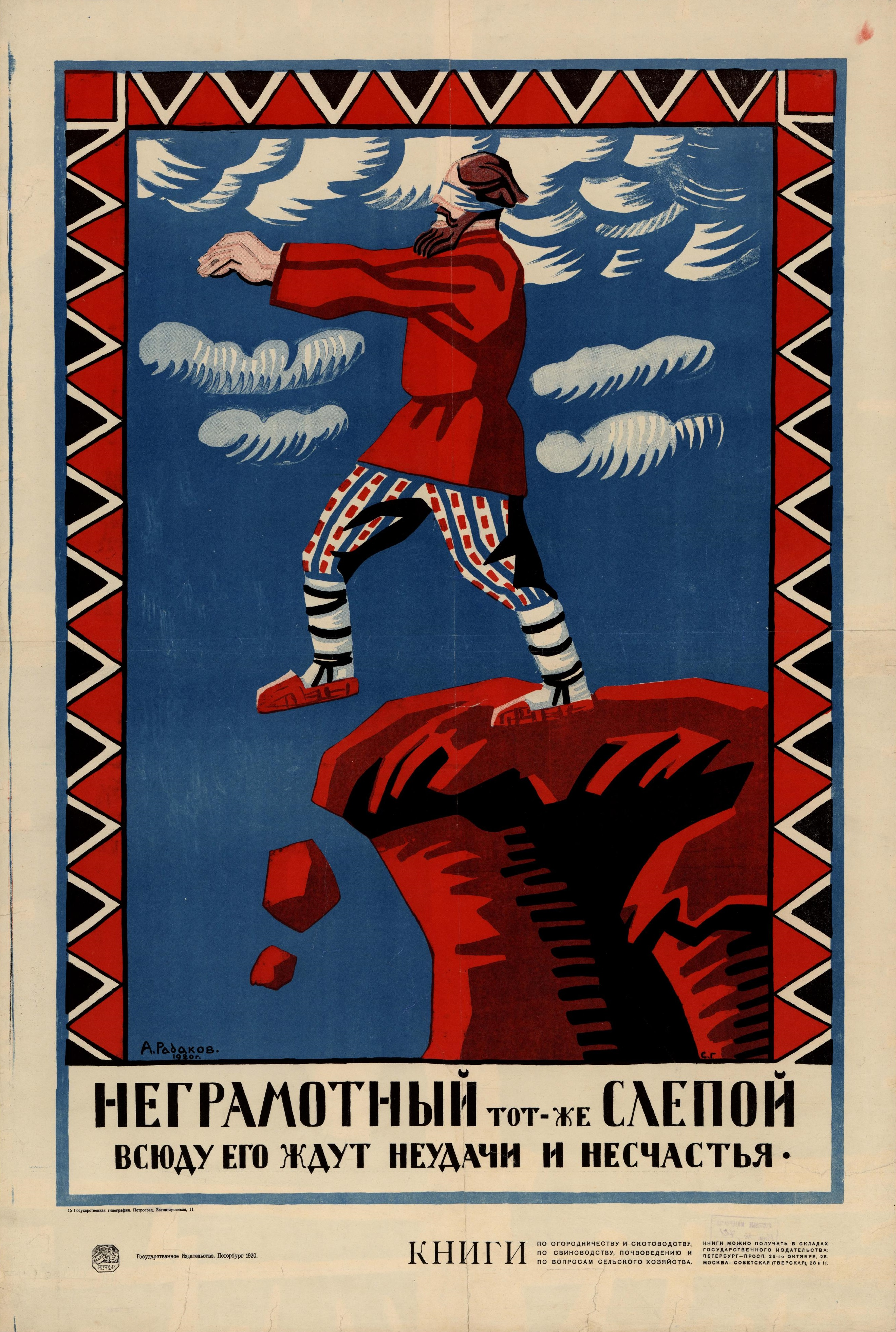 Плакат «Неграмотный — тот же слепой. Всюду его ждут неудачи и несчастья». Москва: Государственное издательство, 1920 Хромолитография, 96×65 см.